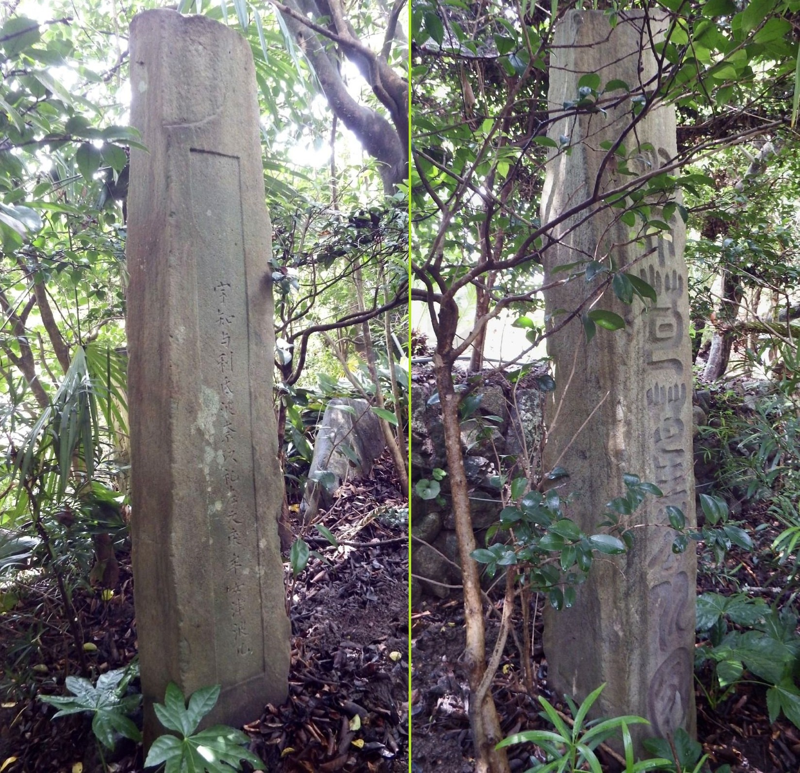 石手寺の祭芭蕉翁冢